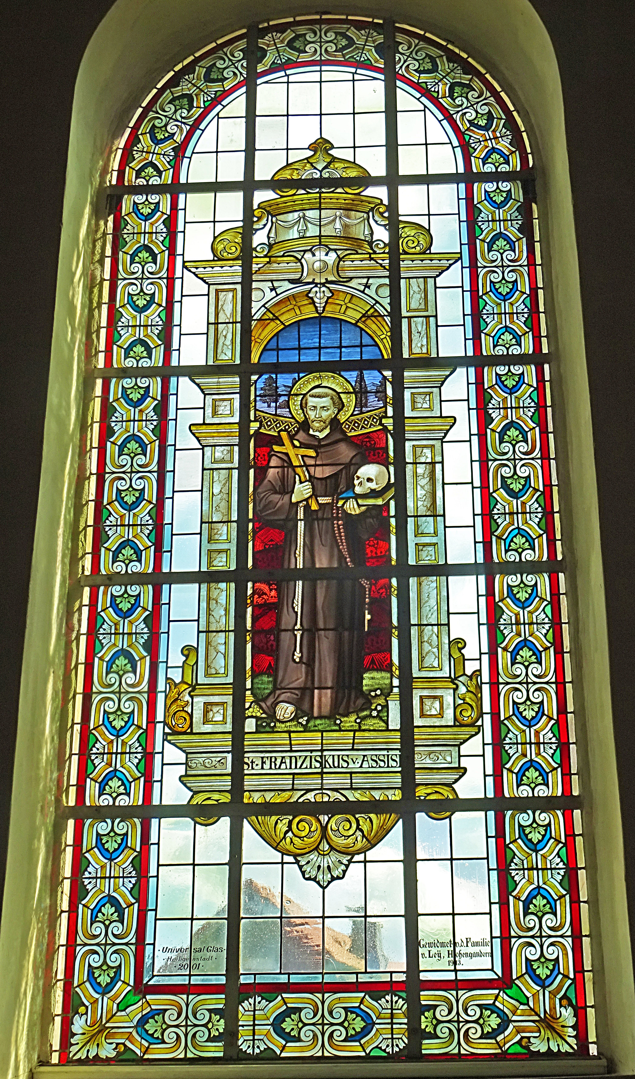 Buntglasfenster in der Dorfkirche St. Bartholomäus (Hohengandern)